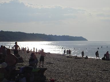 Plaża w Toila, Estonia